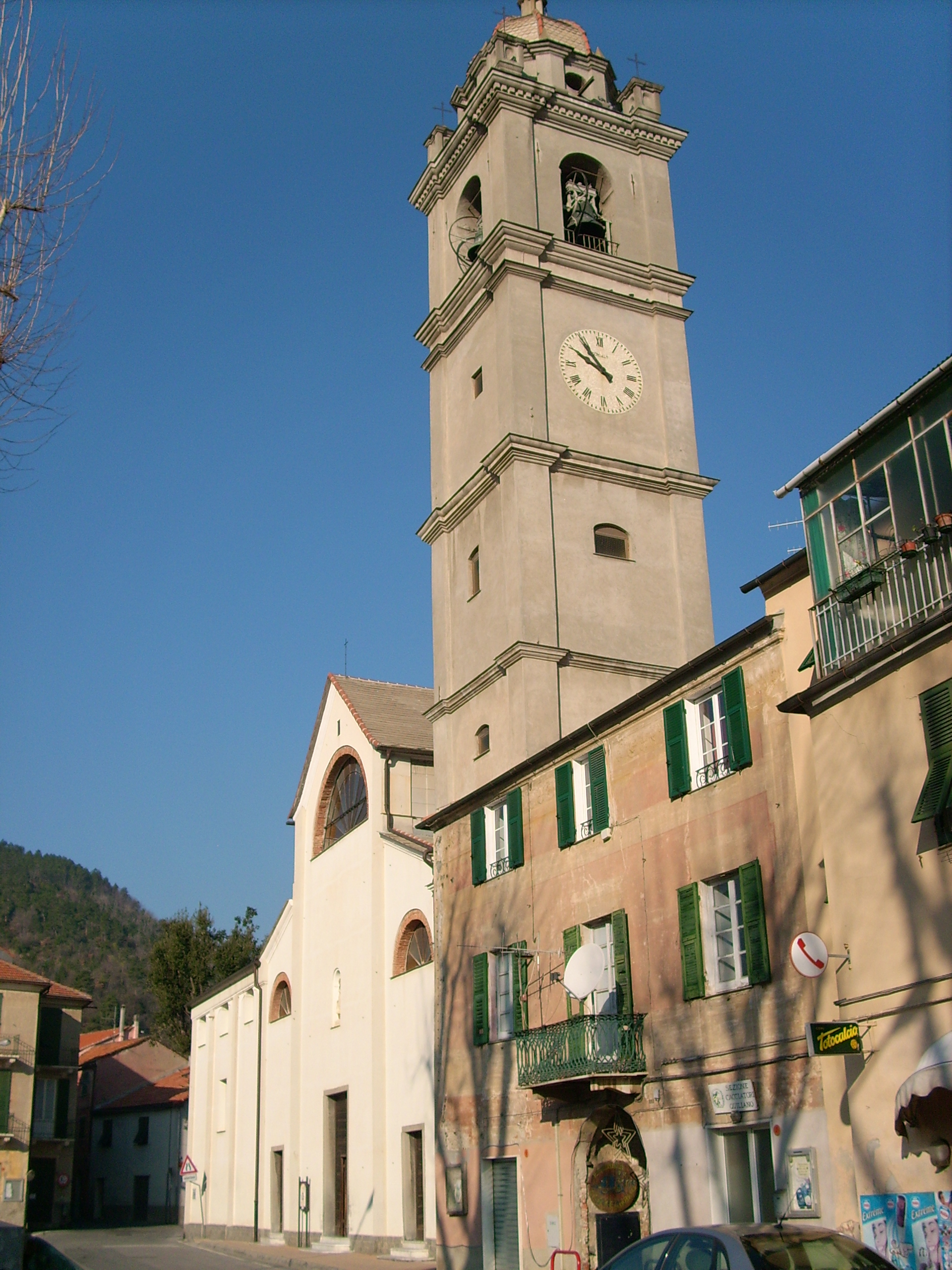 Chiesa di San Lorenzo presso Quiliano, Liguria, Italy